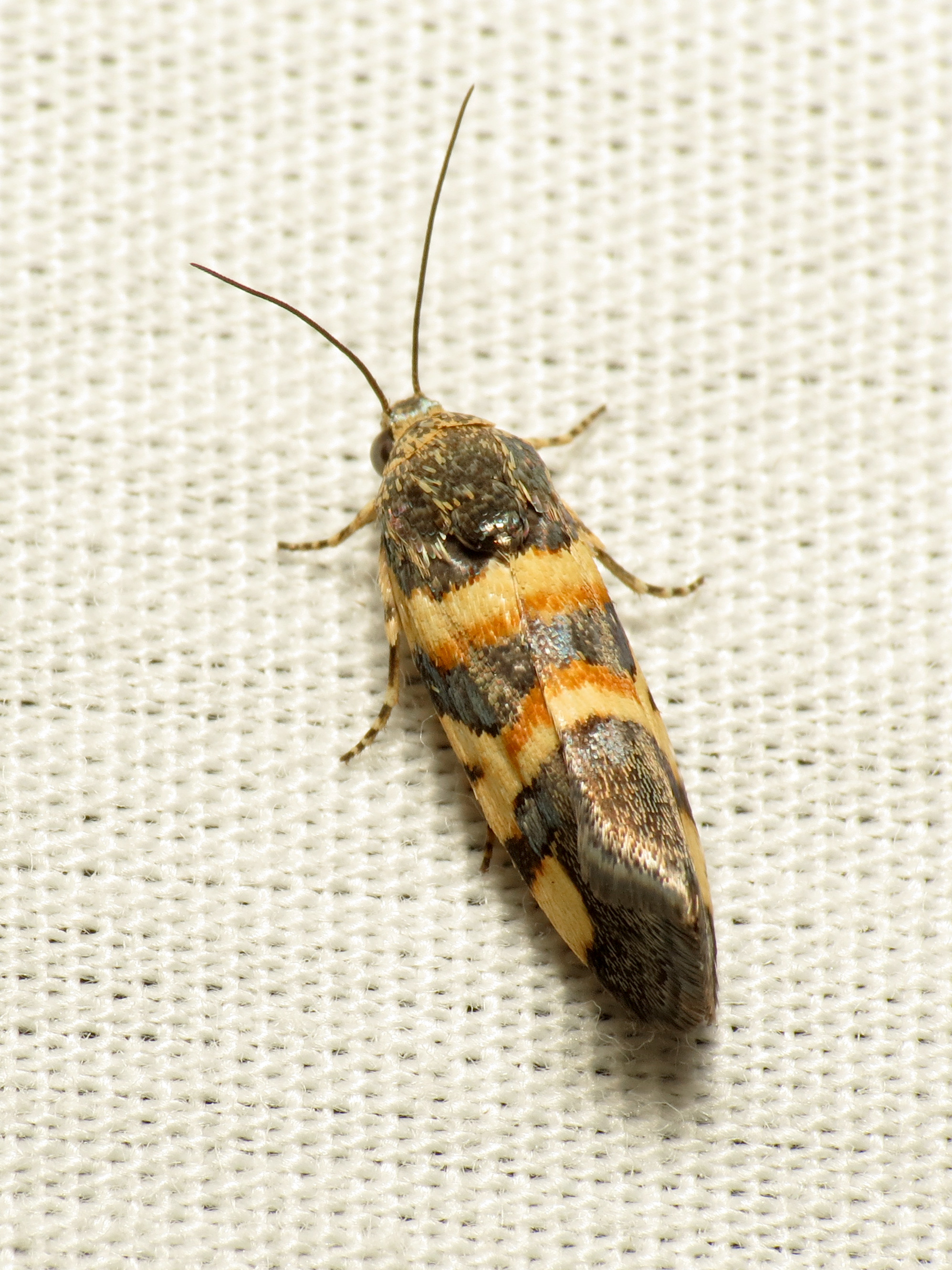 Spragueia funeralis. Peña Blanca, Santa Cruz County, Arizona, USA.